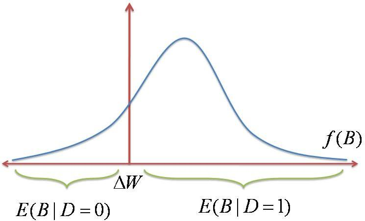 Distribucion de la firma por amenidad